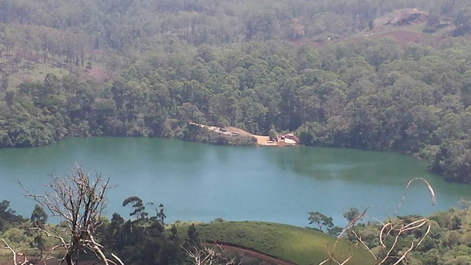 This are picture of Lake Awing and its environment rumored to have exploded on the night of May 19 this year (2018).